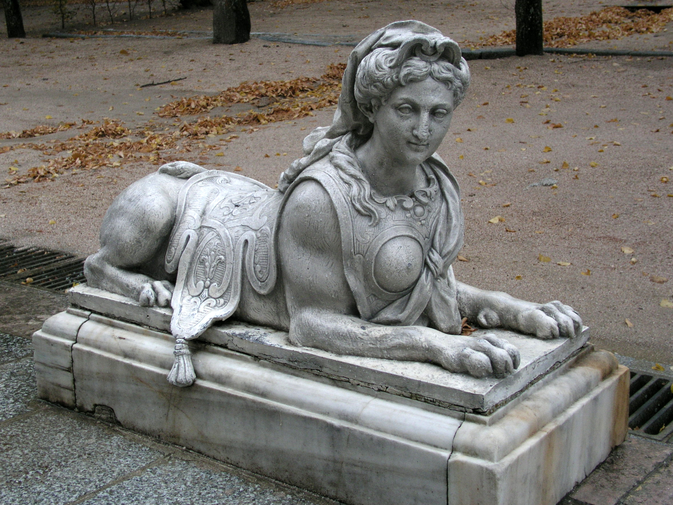 La Granja, Sfinx, Spain.